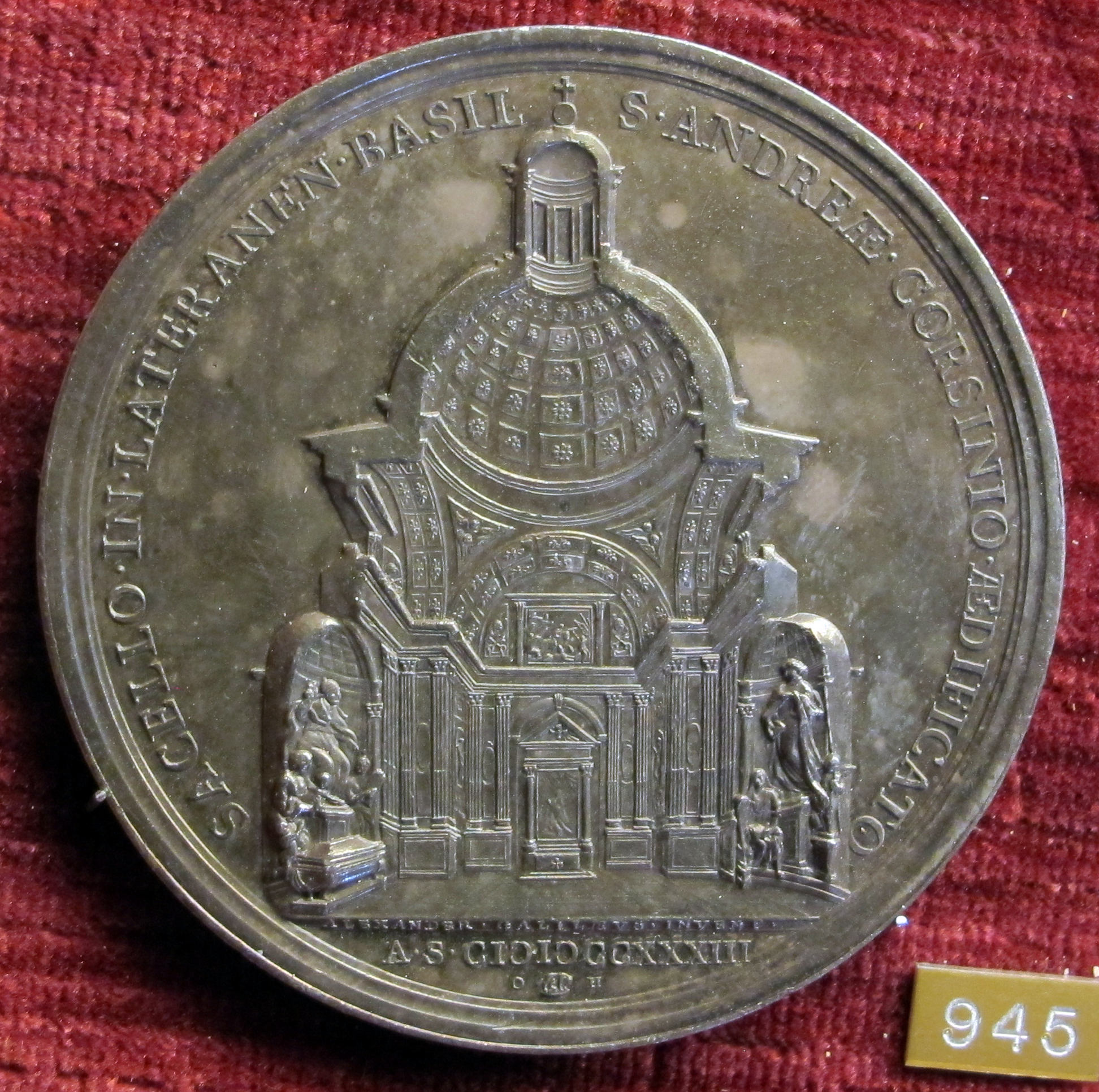 Medaglie romane '600-'700